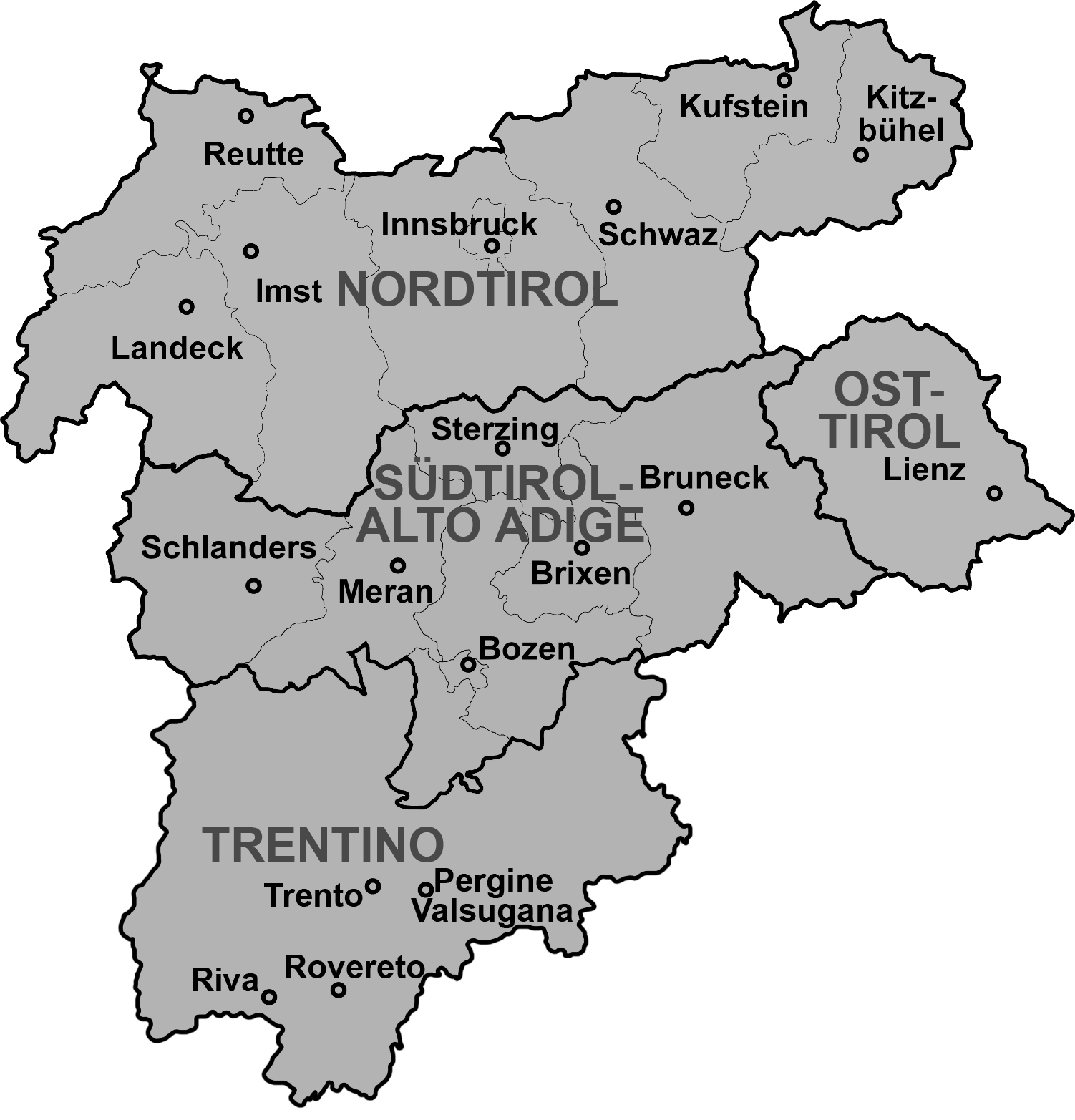 Die historische Region Tirol, sowie die heutige Europaregion Tirol-Südtirol/Alto Adige-Trentino